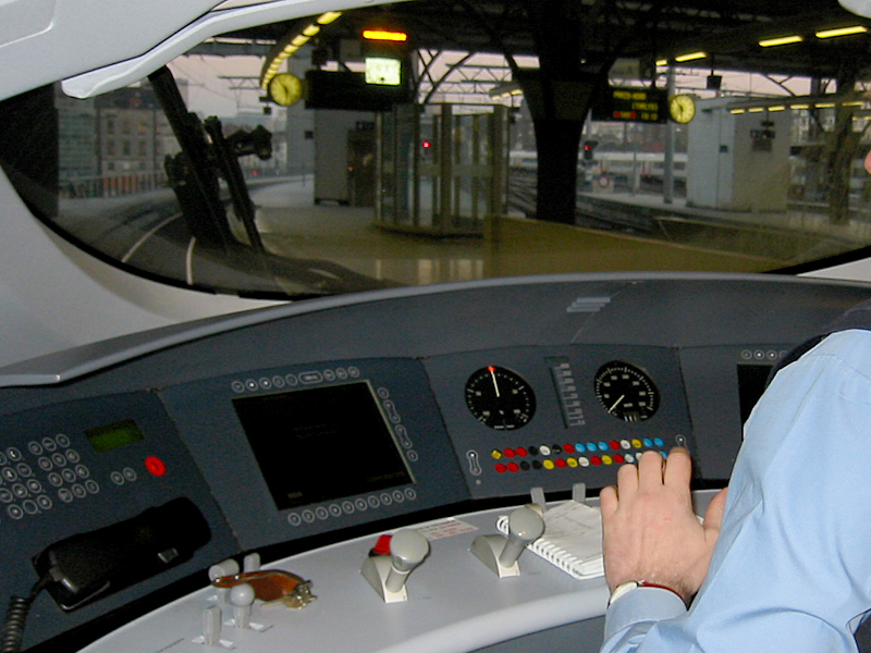 Der Führerstand des ICE 3